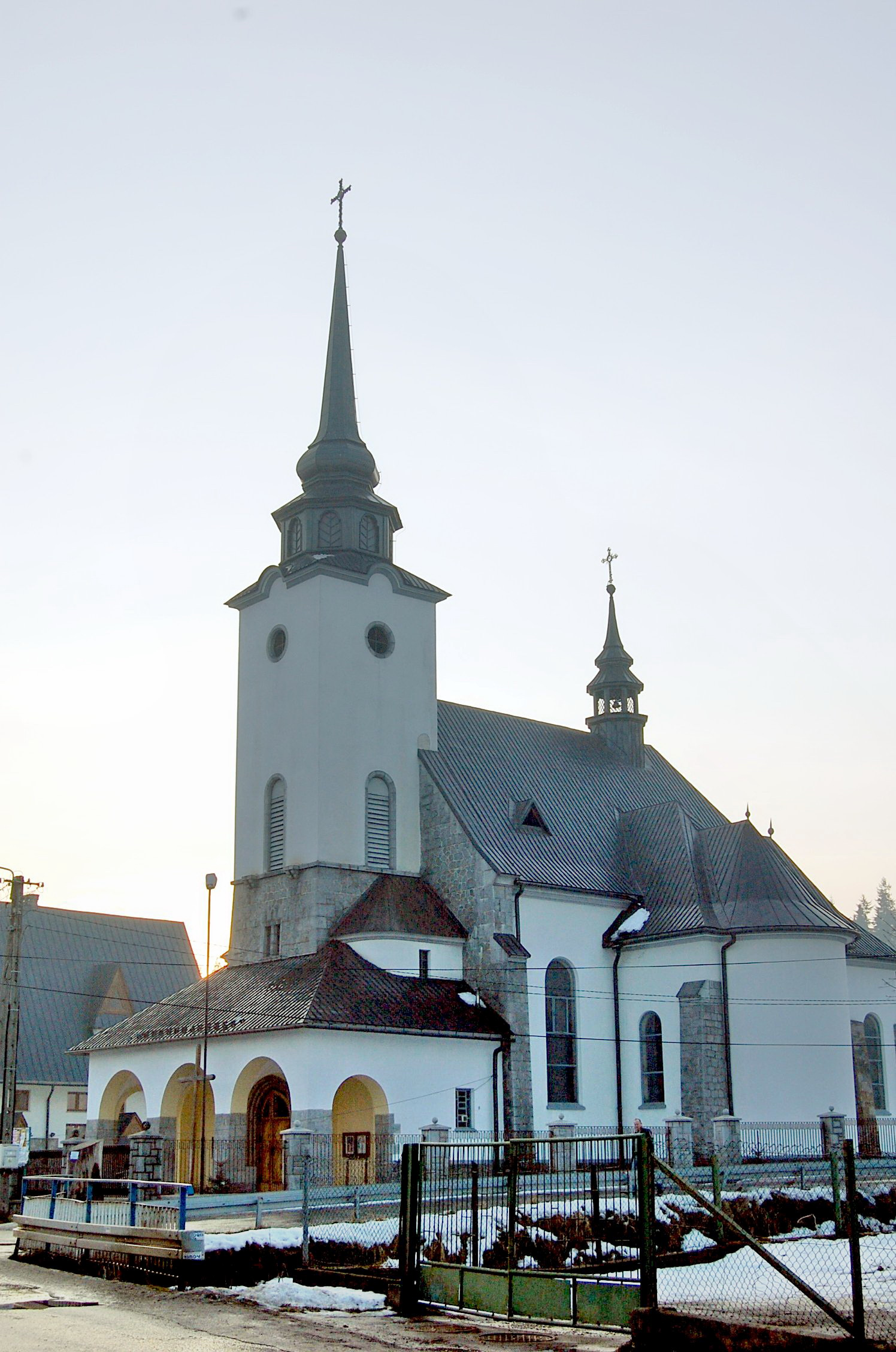 Biały Dunajec - kościół parafialny p.w. Matki Bożej Królowej Aniołów